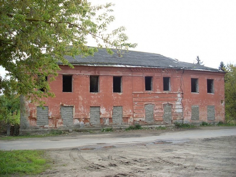 Магілёў. Школішча. Яўрэйская школа